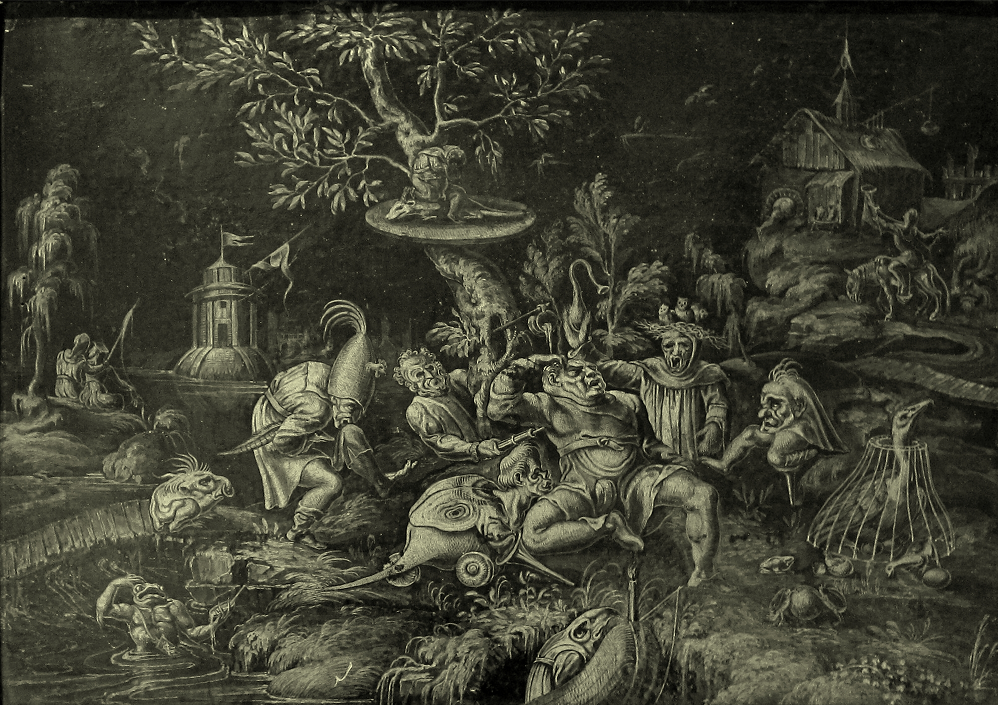 Le cauchemar au Musée des beaux-arts de Strasbourg.